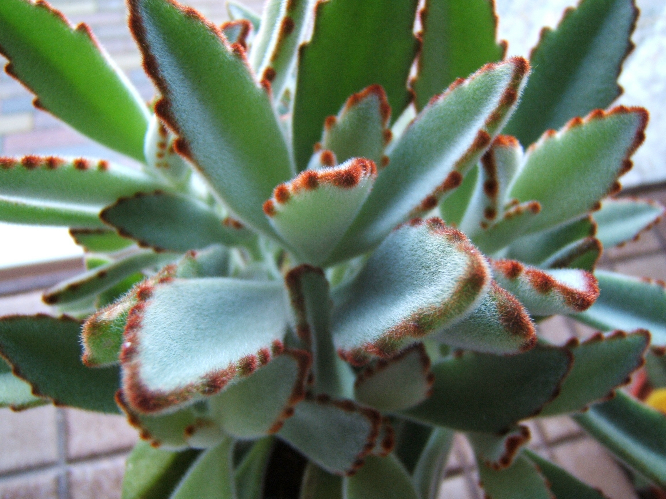 Kalanchoe tomentosa